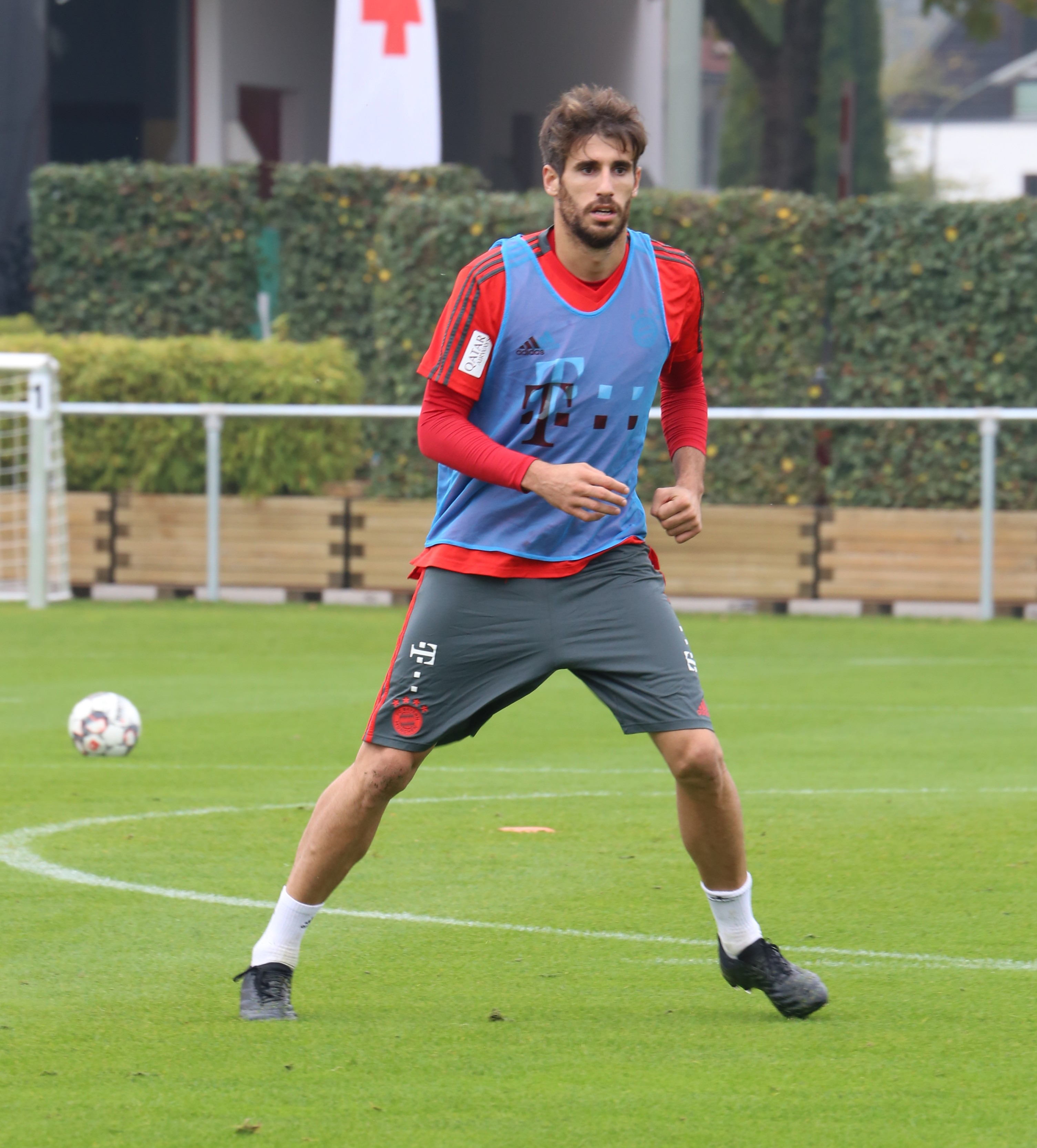 Javi Martínez, am 9. Oktober 2018 beim Training auf dem Gelände des FC Bayern München